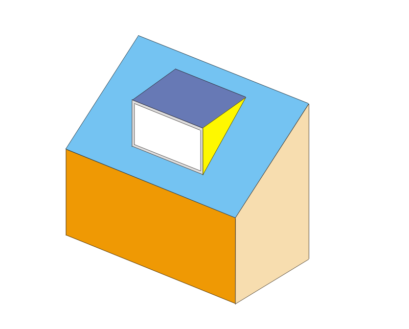 schema dakkapel. Martink. 4 febr 2007